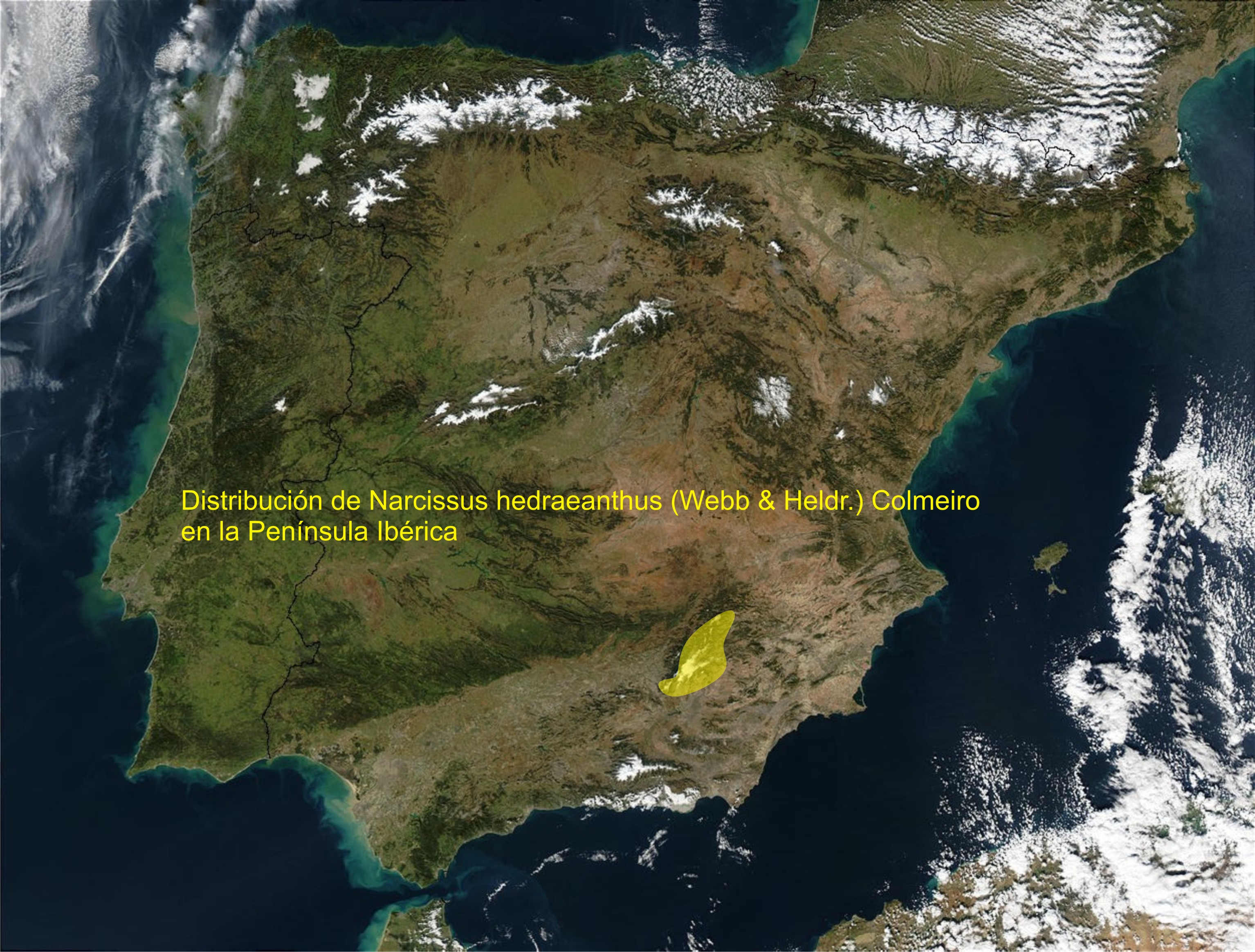 Área de distribución de Narcissus hedraeanthus (Webb & Heldr.) Colmeiro en la Península Ibérica.